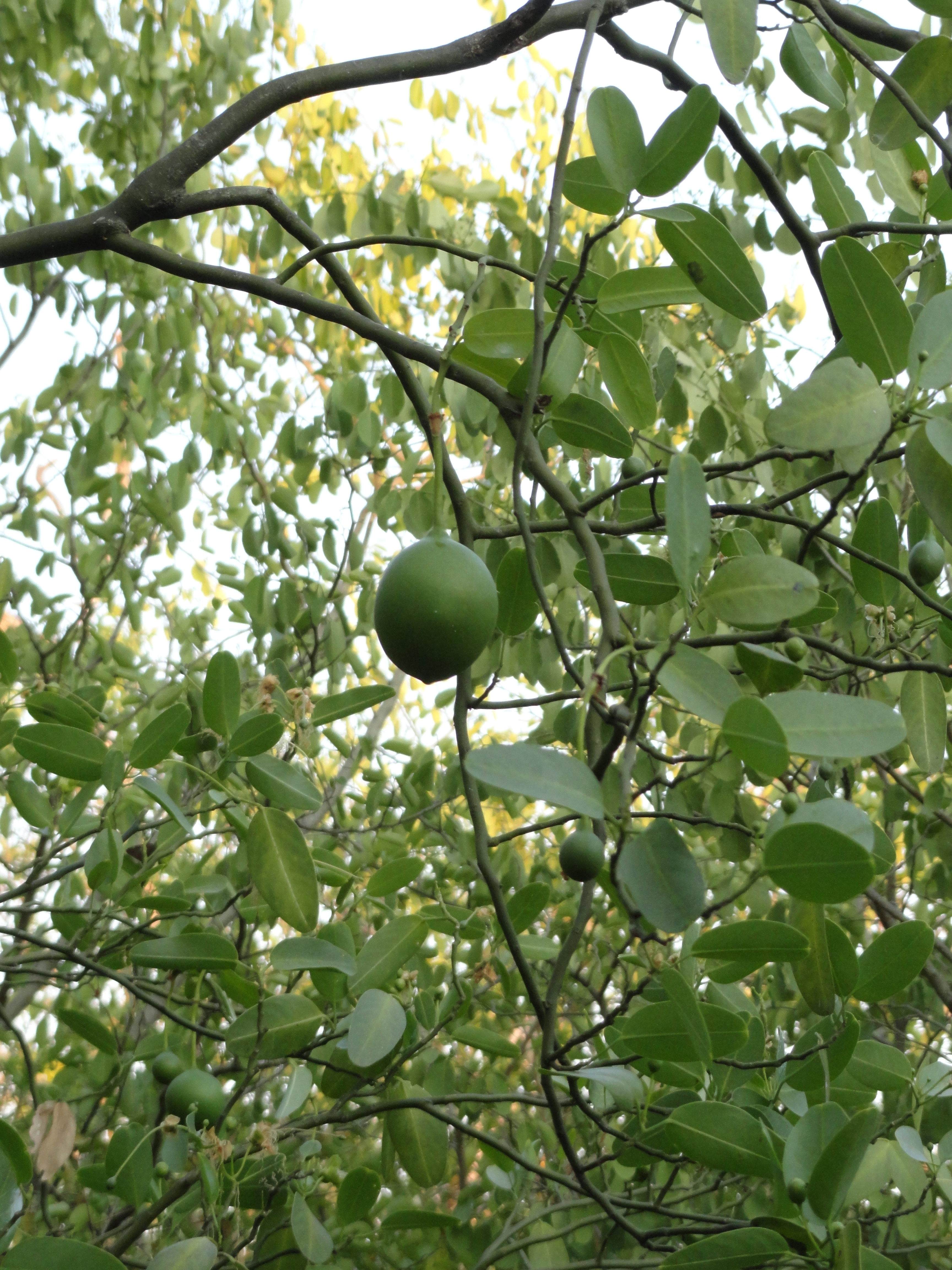 Capparis speciosa. Observada en zona Laguna Fortín General Díaz, Alto Paraguay, Chaco Paraguayo